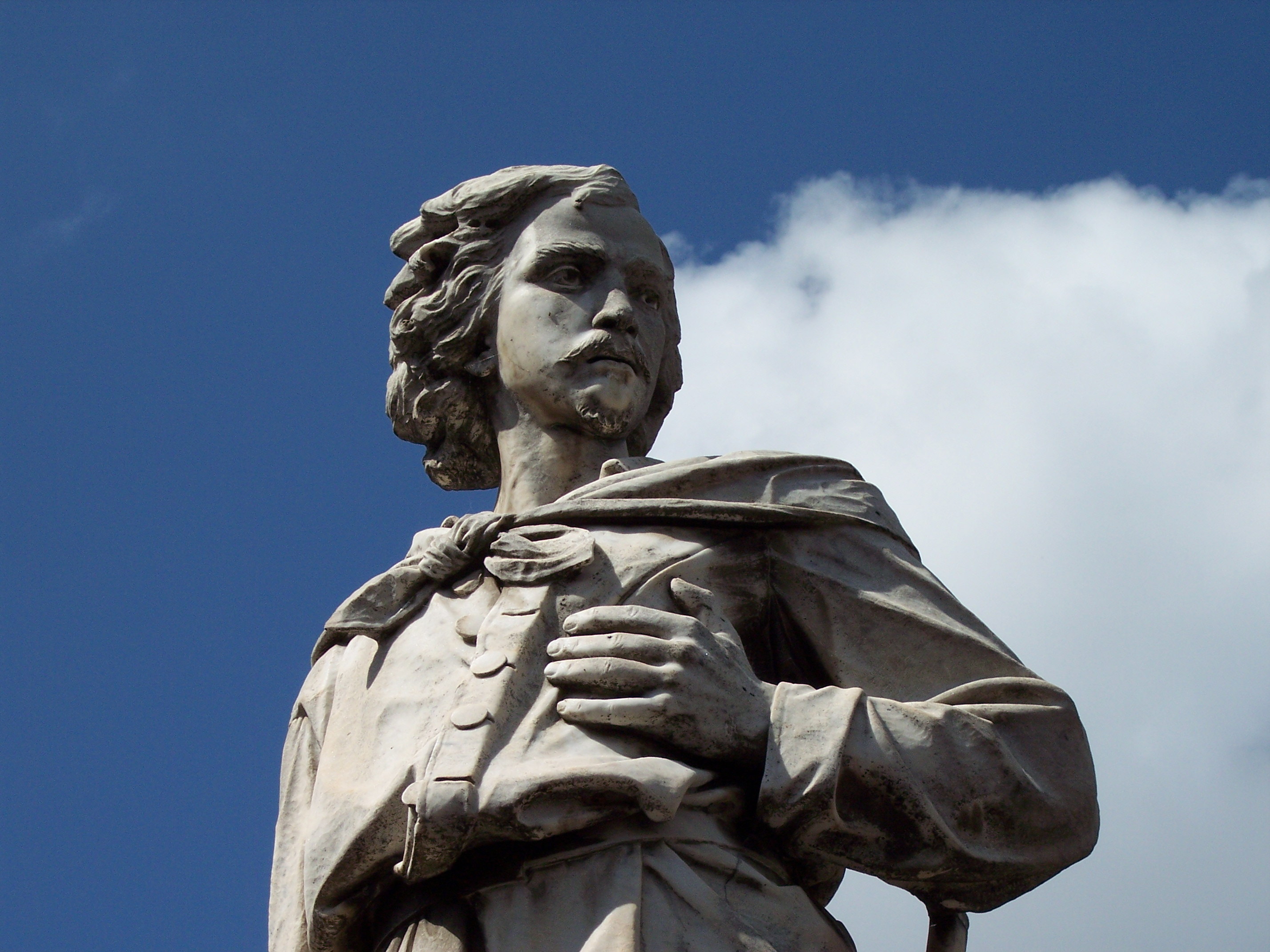 Primo piano della statua dedicata A Giovanni Battista Falcone di Acri,statua realizzata nel 1800